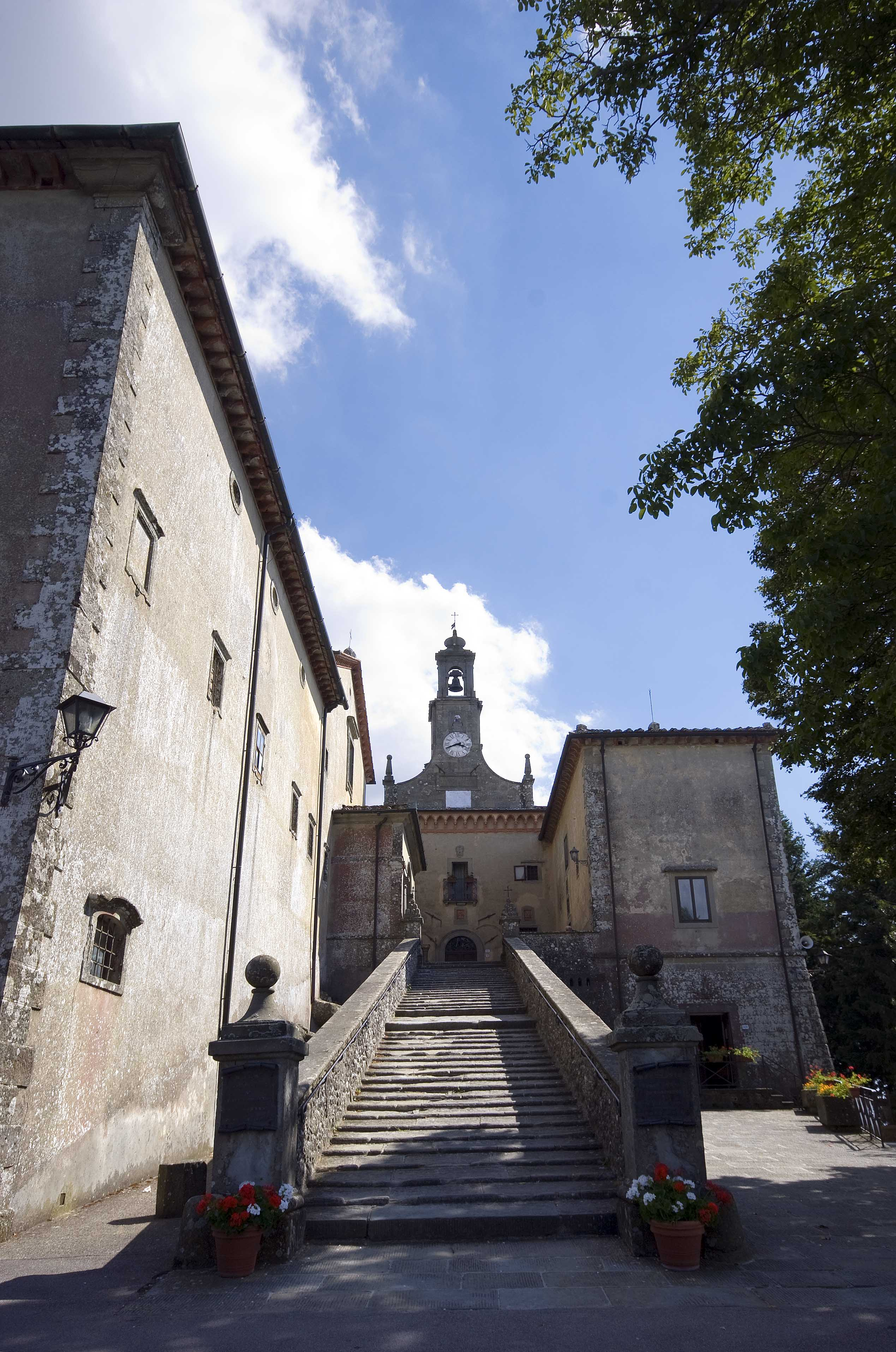 scalinata di ingresso al convento di montesenario